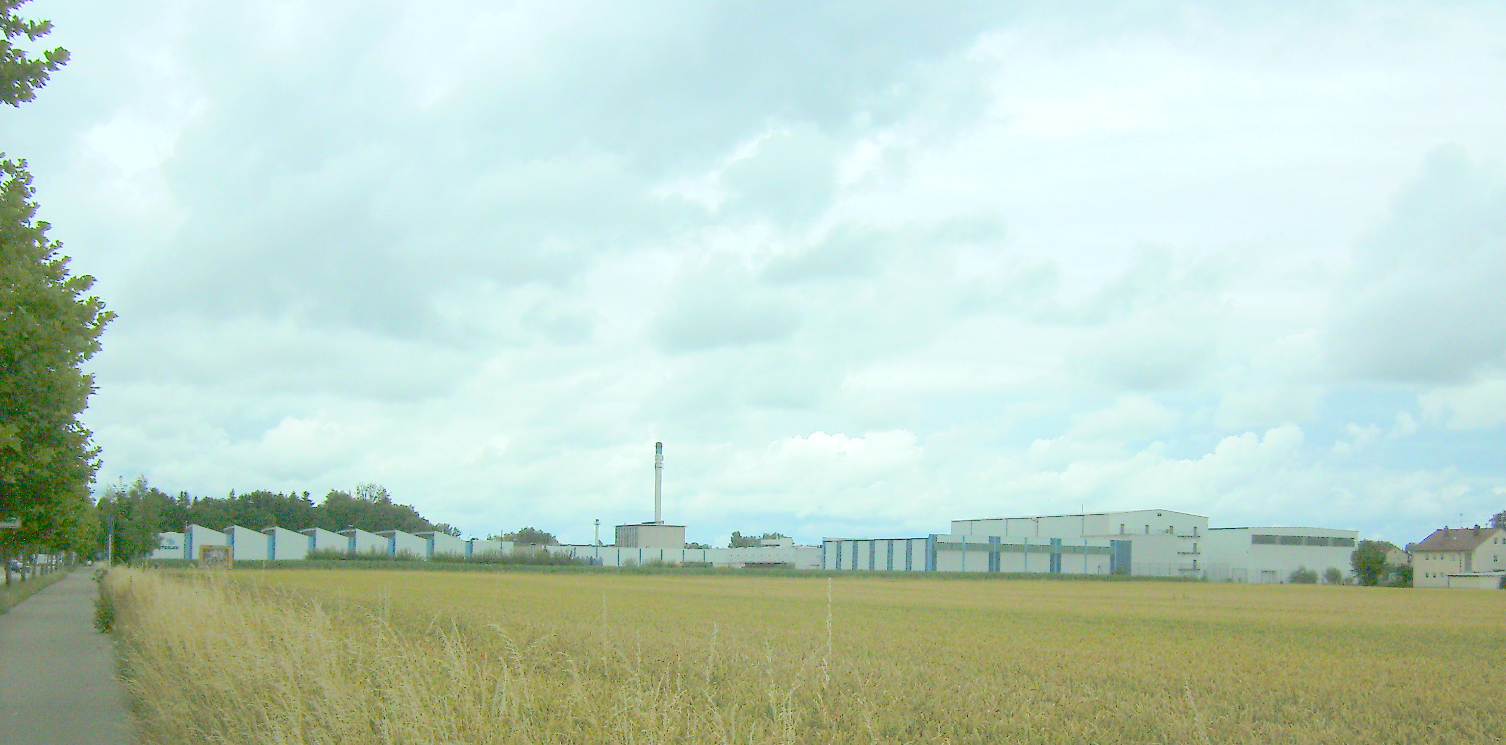 Metzeler Memmingen Nordseite